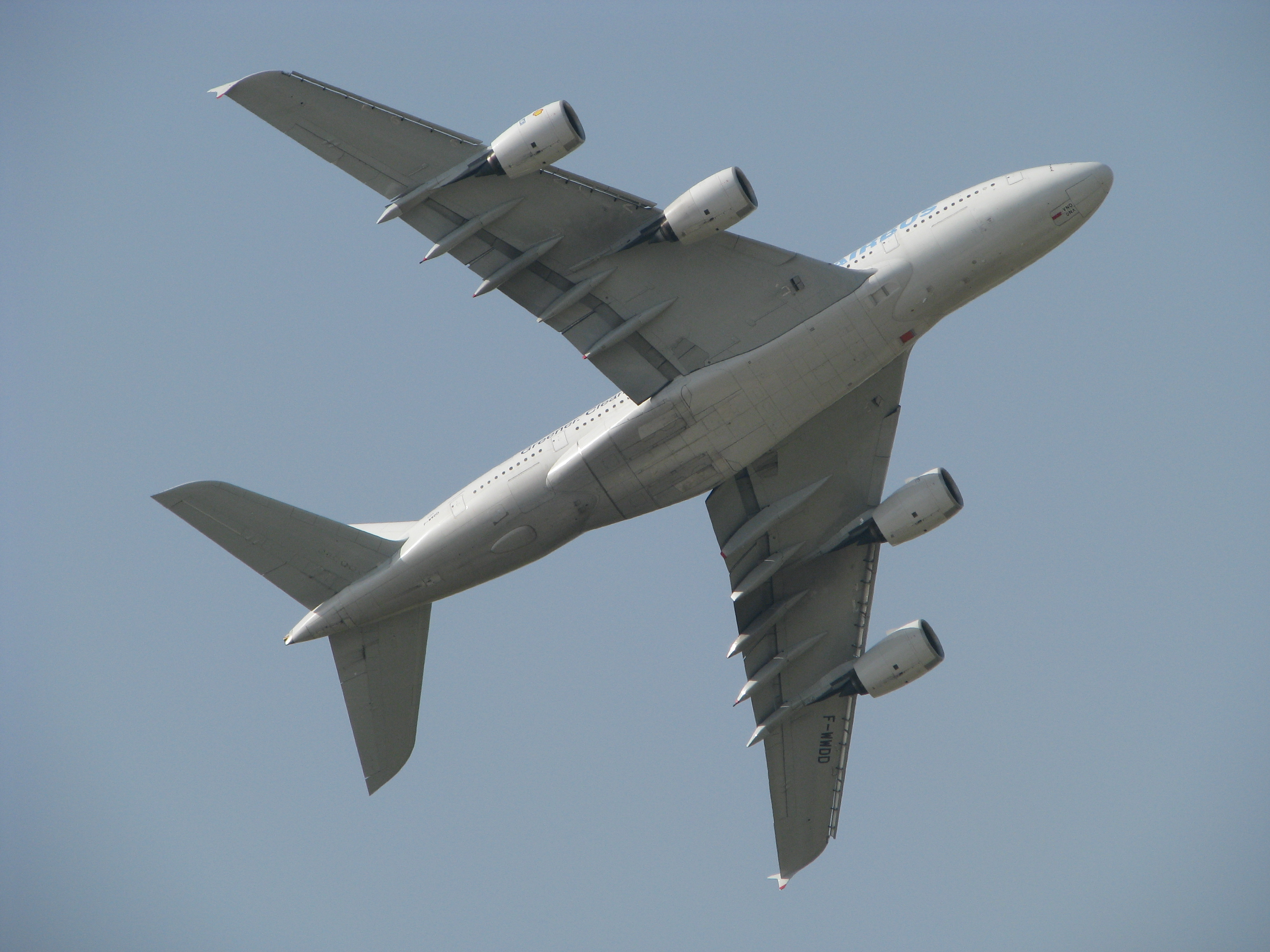 Flugvorführung des Airbus A380 Kennzeichen F-WWDD in Berlin (ILA 2008)